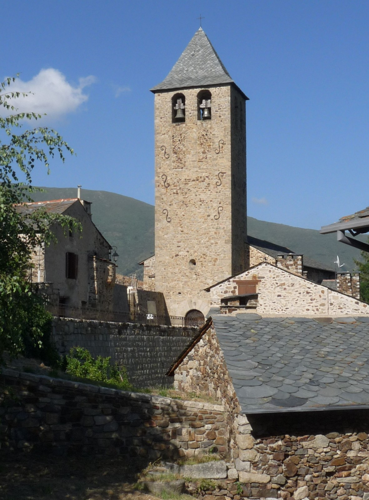 Eglise d'Ayguatébia, Pyrénées-Orientales, France